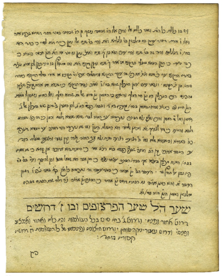 כתב יד של רבי שבתי מרשקוב, תלמידו וסופרו של הבעל שם טוב. בתמונה קטעי העתקה של הספר "עץ חיים" מתורת האר"י שנכתבה על ידי תלמידו רבי חיים ויטאל. הדף כתוב משני עבריו